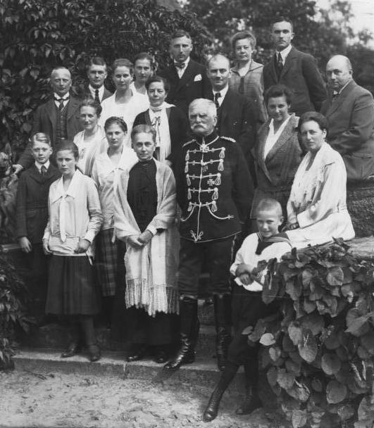 Generalfeldmarschall [August] von Mackensen wird am 6. Dezember 1929 80 Jahre alt. Der Generalfeldmarschall im Kreise seiner Familie.